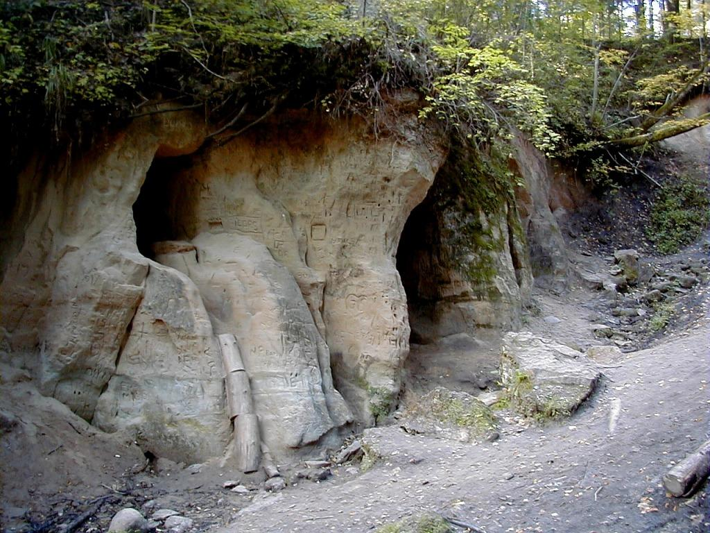 Māras kambari pie Abavas 2000-09-16